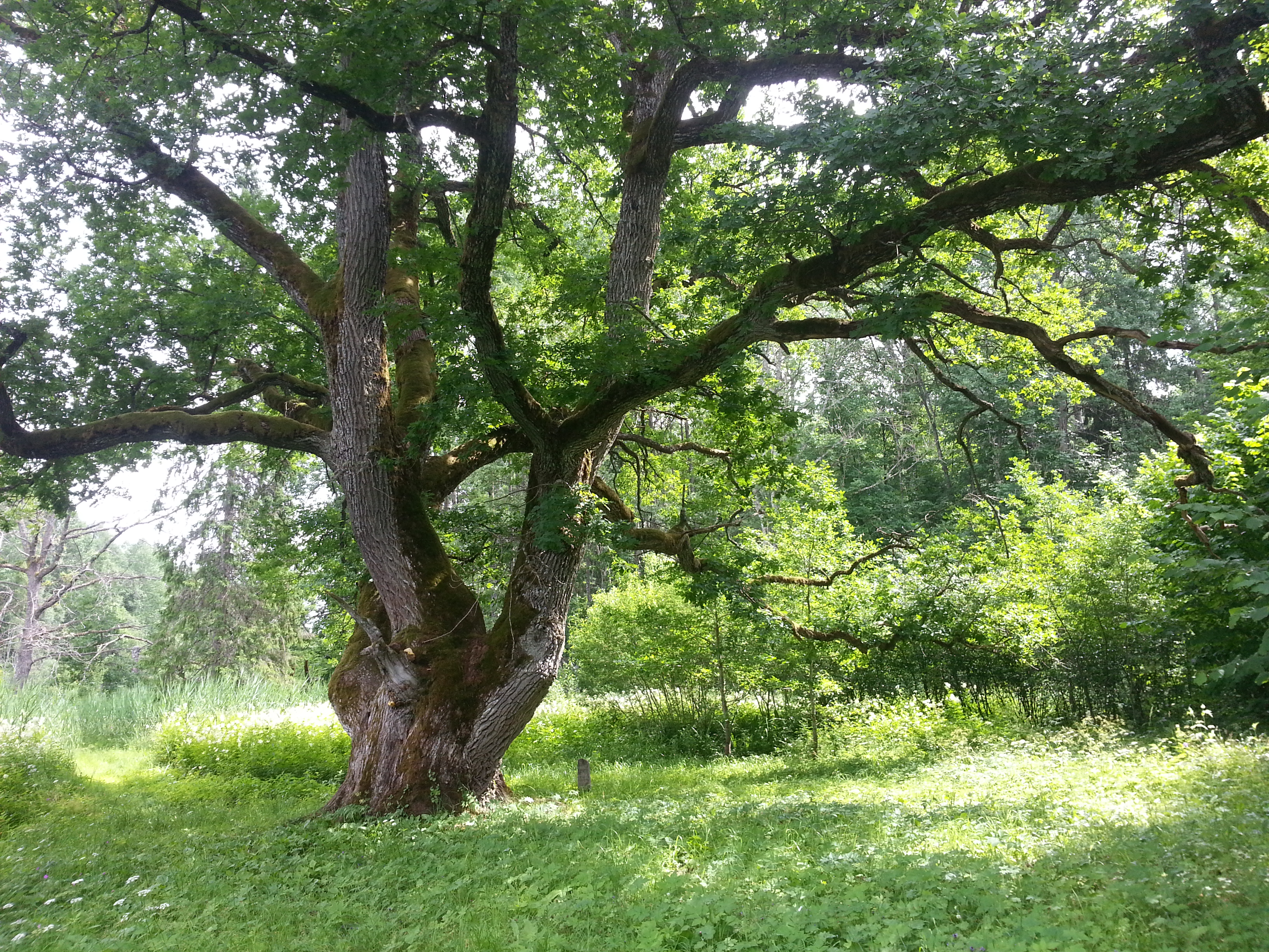 Lemmjõe tamm